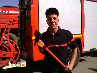 عون الحماية المدنية الجزائرية